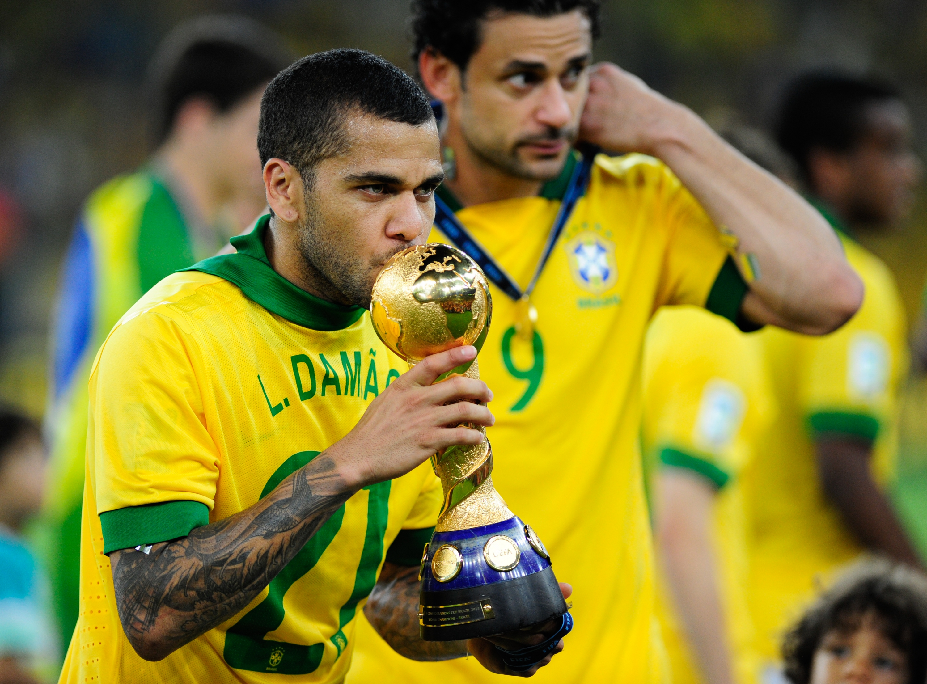 No Estádio do Maracanã, Brasil e Espanha disputam a taça da Copa das Confederações de 2013.